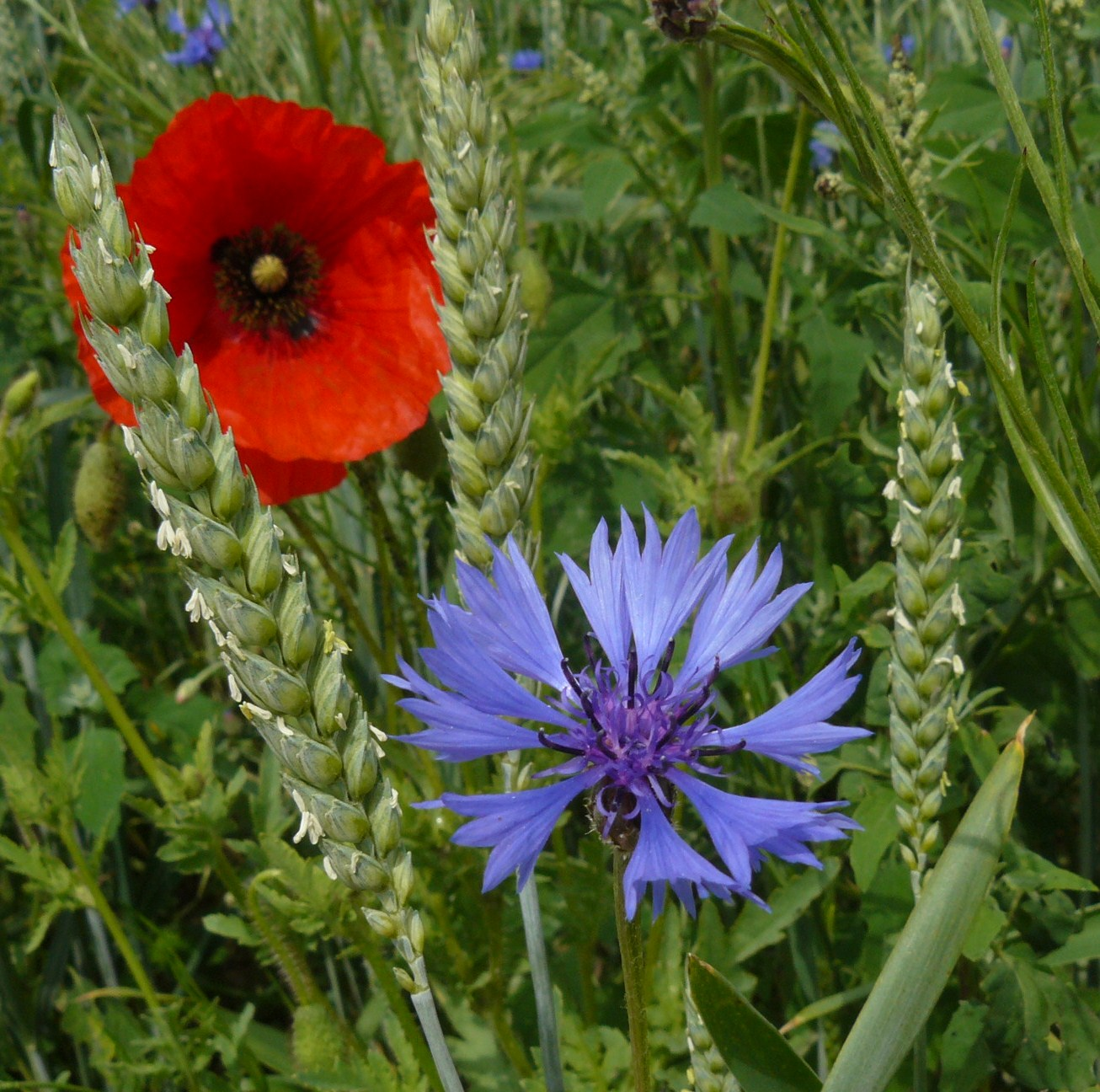 Maki w Kicinie.